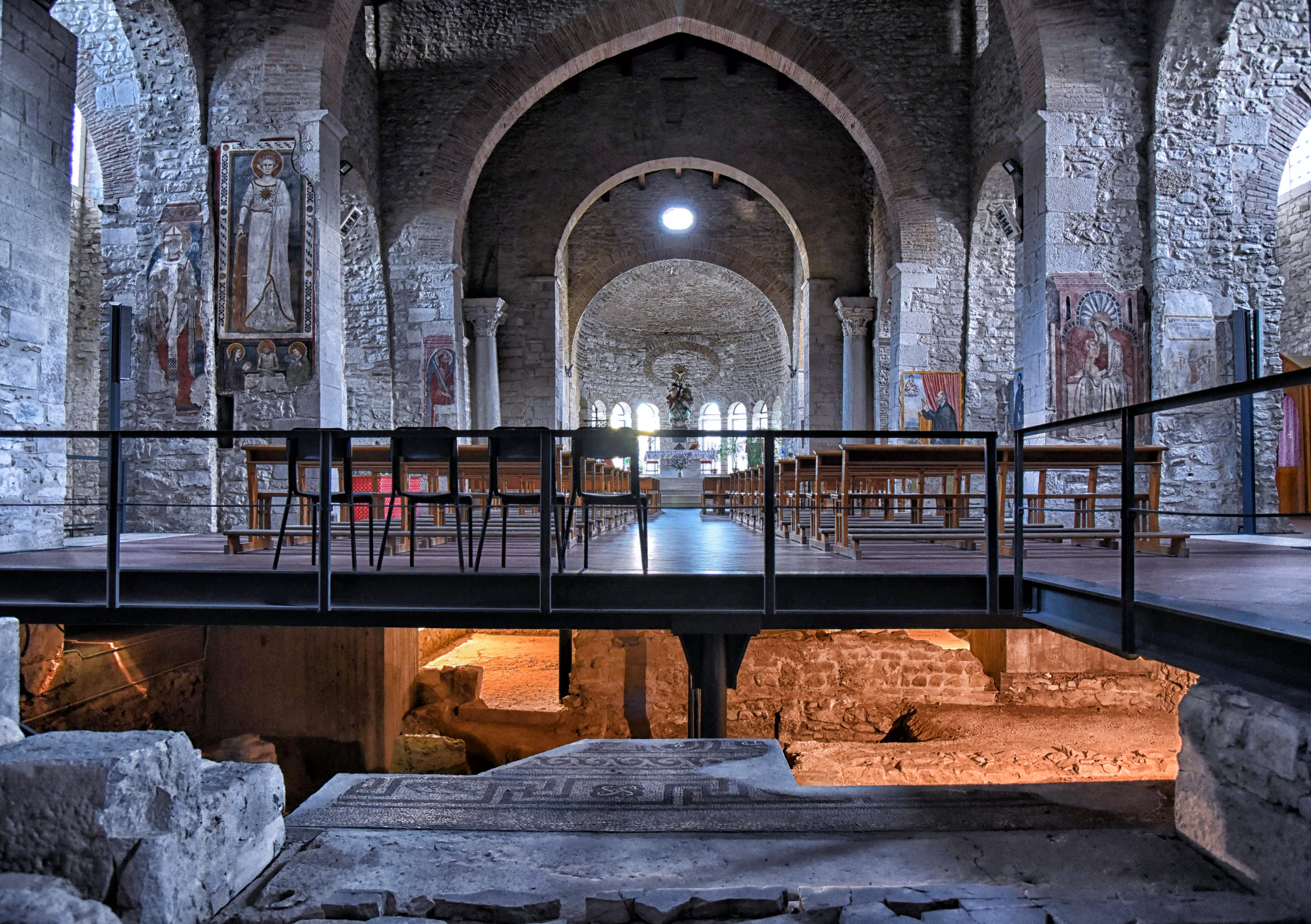 abbazia della Santissima Trinità This is a photo of a monument which is part of cultural heritage of Italy.